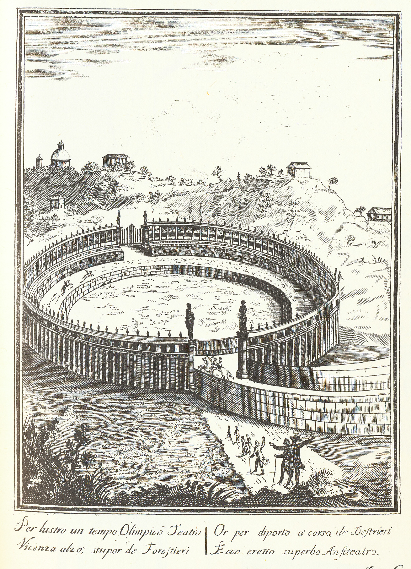 Circo in Campo Marzo - Incisione di Anonimo fine sec. XVIII, in Vicenza città bellissima, edito da Biblioteca Civica Bertoliana.